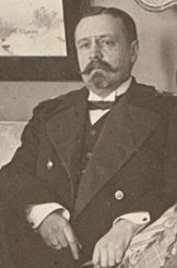 Николай Георгиевич Бюнтинг (Nikolai von Bünting) (1861, Санкт-Петербург — 1917, Тверь), курский вице-губернатор с 26.09.1897 по 15.02.1903, впоследствии Архангельский, Эстляндский и Тверской губернатор. Убит в ходе февральской революции